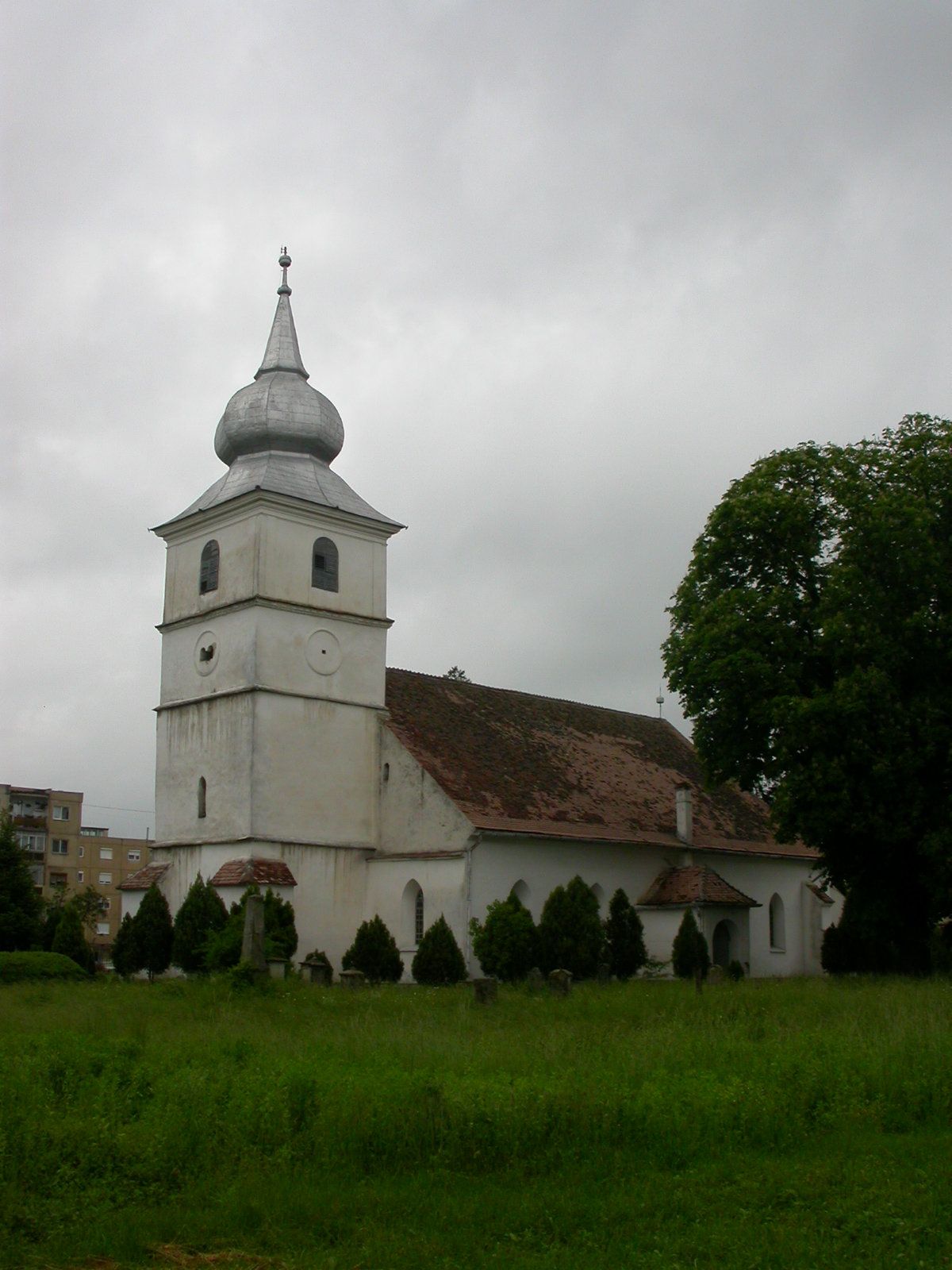 Biserica reformată, 1712 - 1715